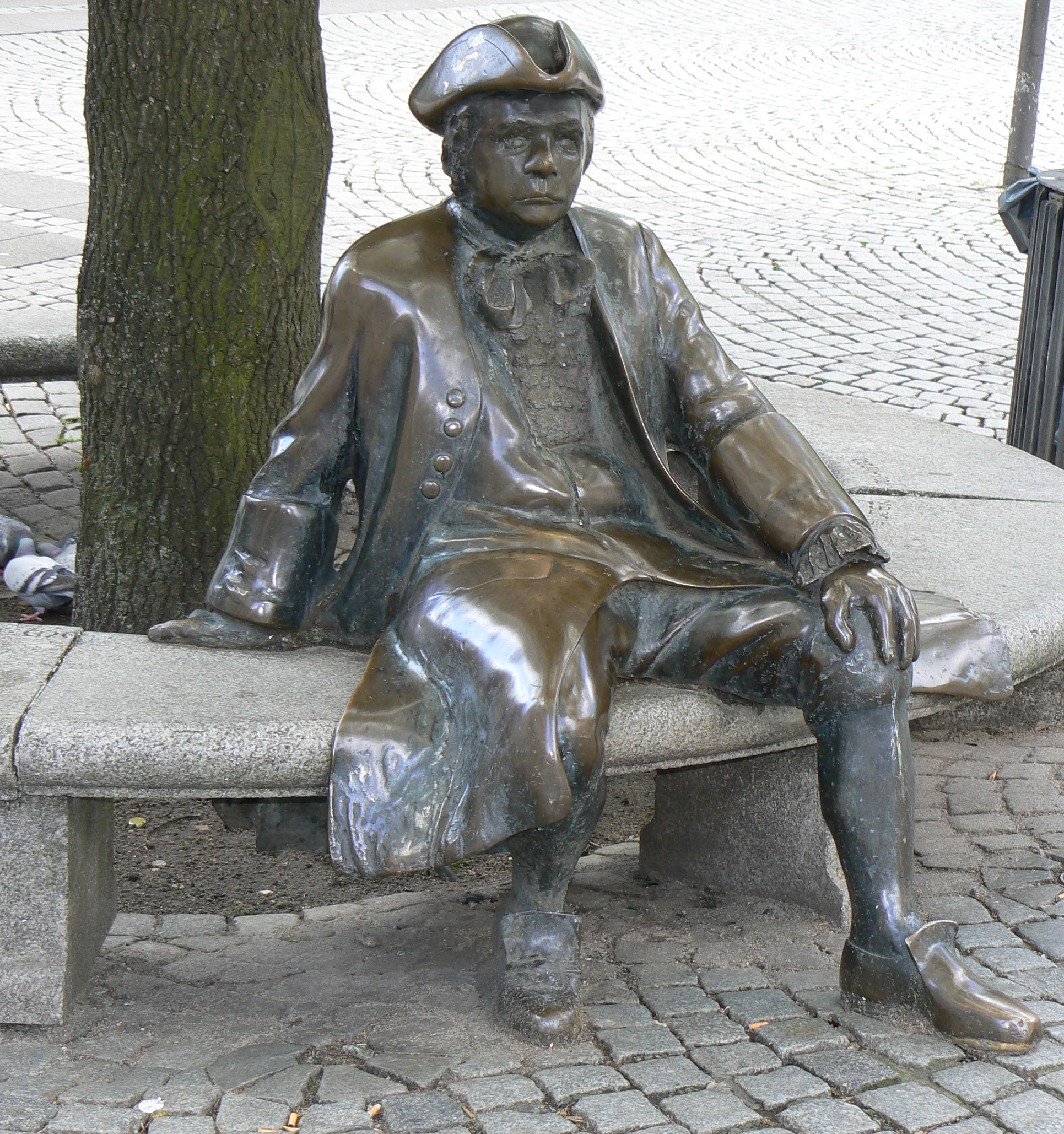 Bronzeplastik des ehemaligen Kieler Bürgermeisters Asmus Bremer von Frauke Wehberg (1982). Standort: Asmus-Bremer-Platz in Kiel.